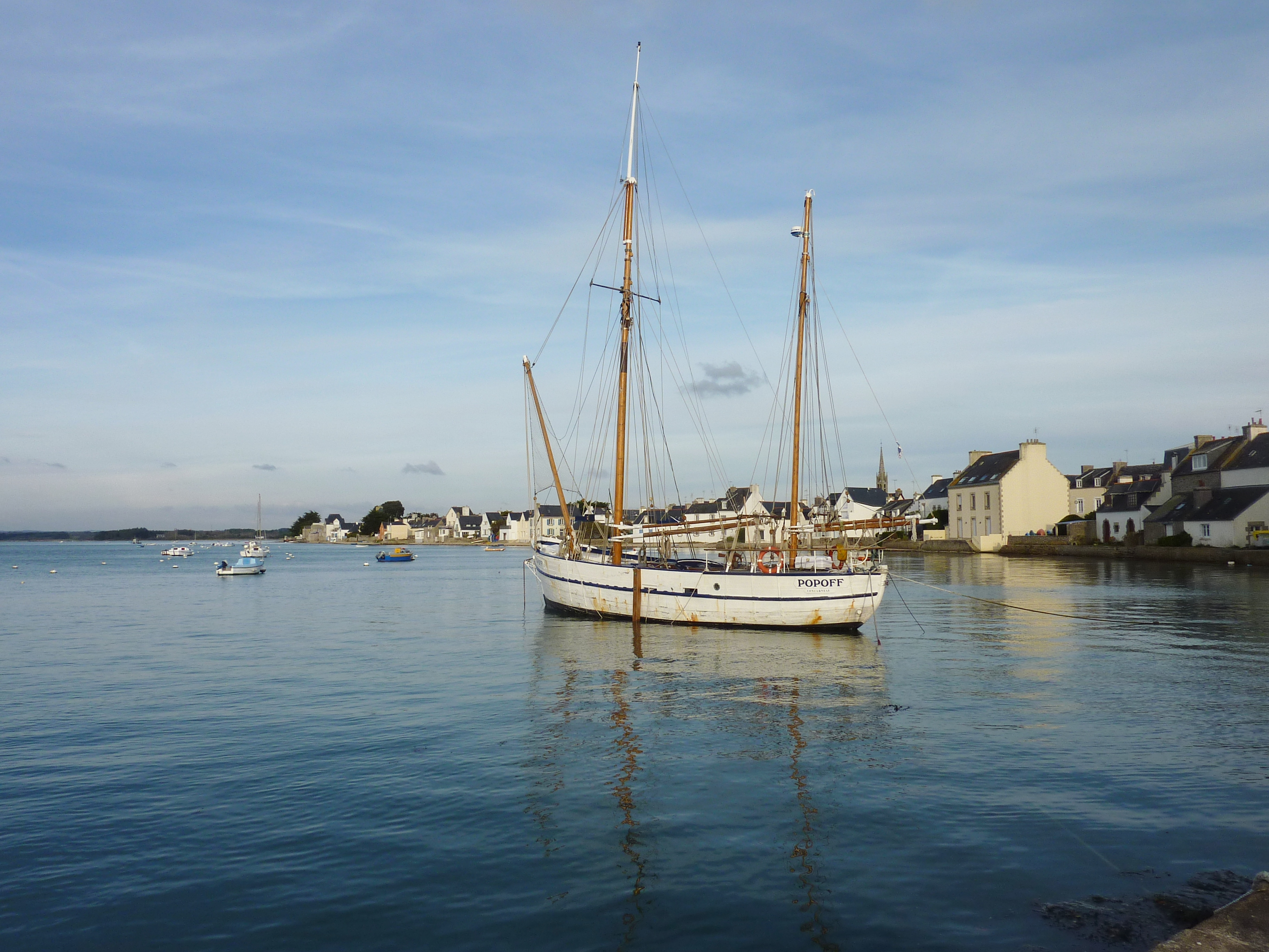 Île-Tudy : le vieux gréement Popoff, ancien chalutier à voiles de Concarneau, construit en 1946 à La Rochelle, et restauré, dans le port de l'Île-Tudy